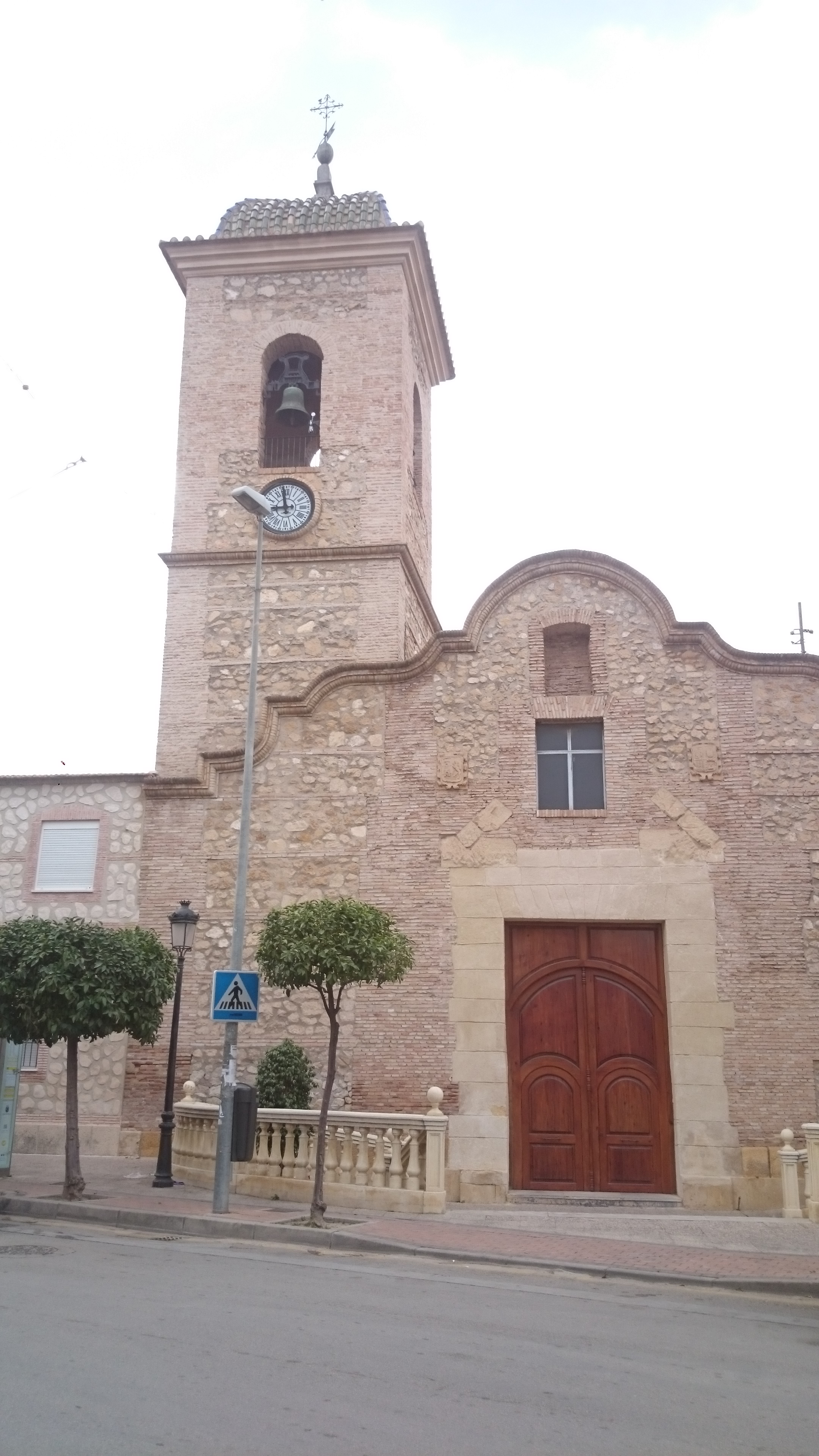 fachada iglesia de aljucer